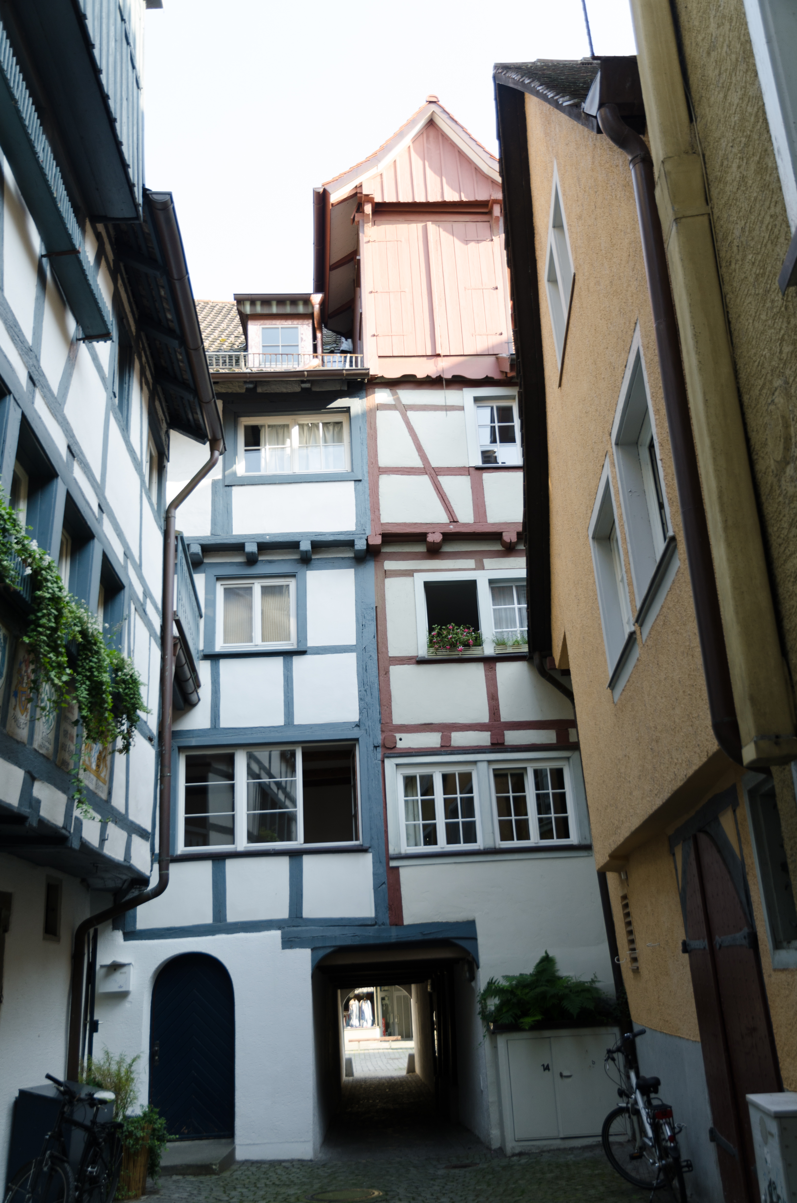 Lindau, Maximilianstraße 12, Rückansicht